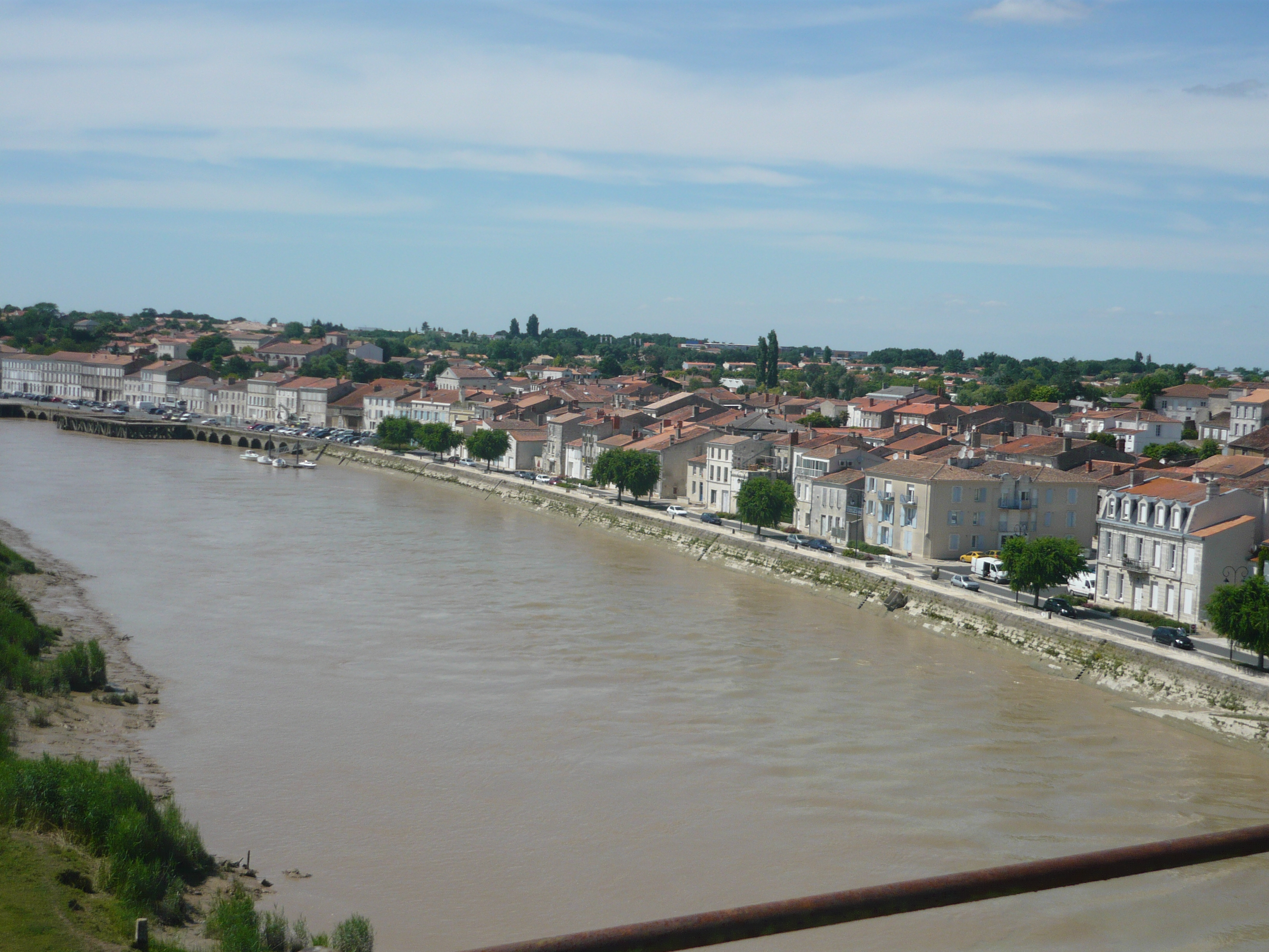 Vue générale sur la rive droite du fleuve à Tonnay-Charente (Charente-Maritime).